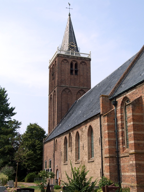 Dorpskerk van Castricum